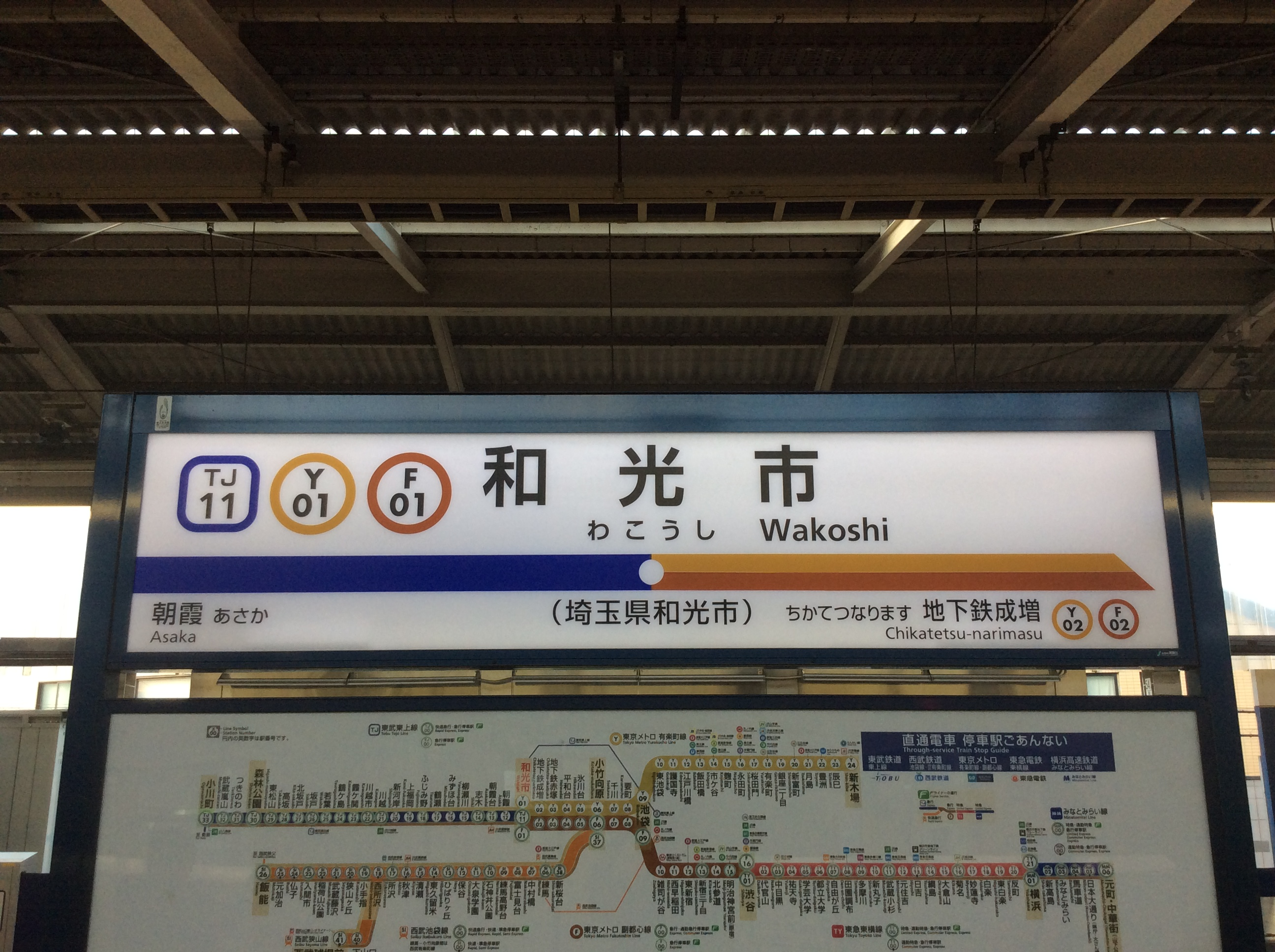 和光市駅の駅名標